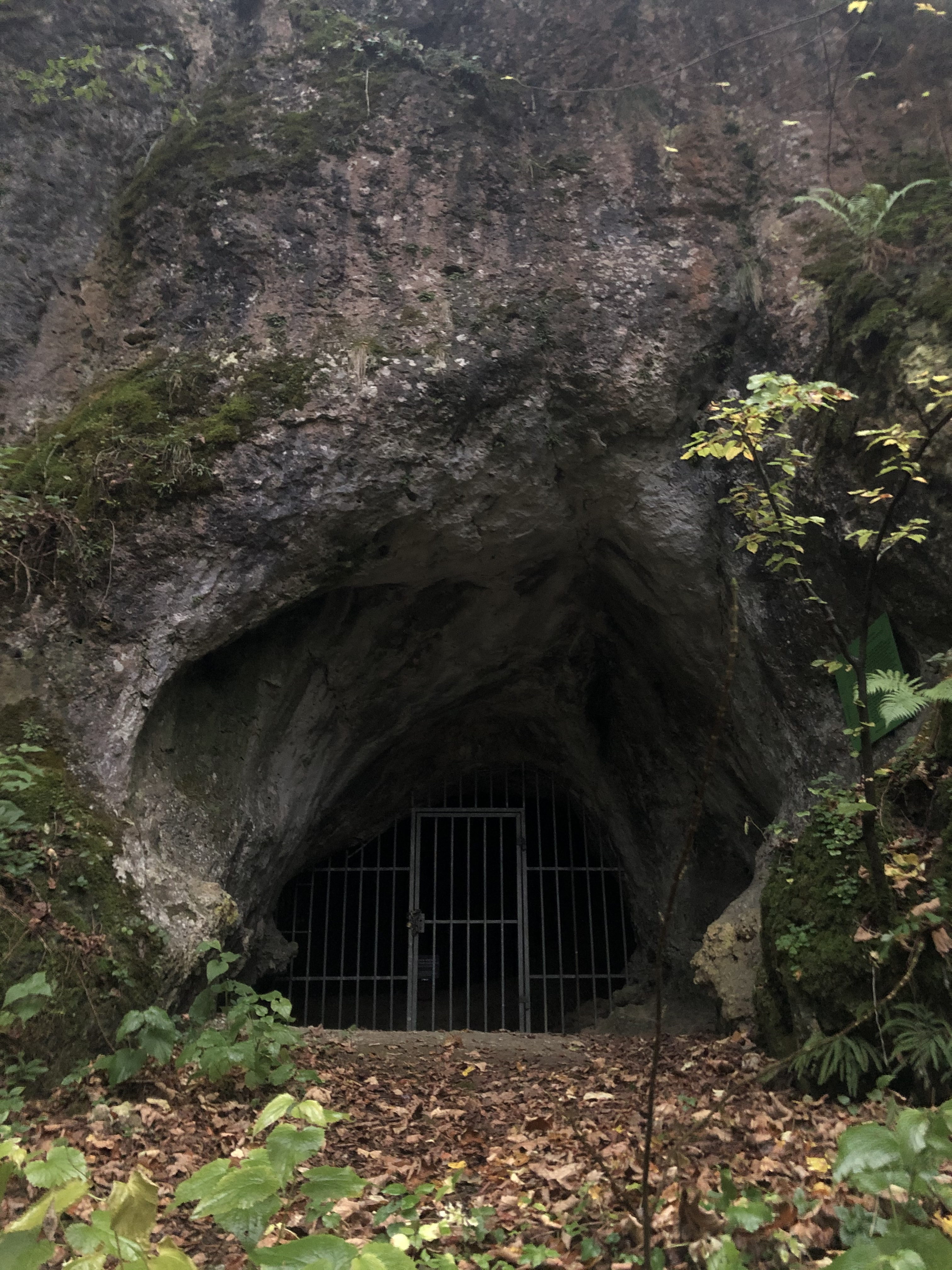 Eingangsportal des Hohlen Steins bei Böhmfeld